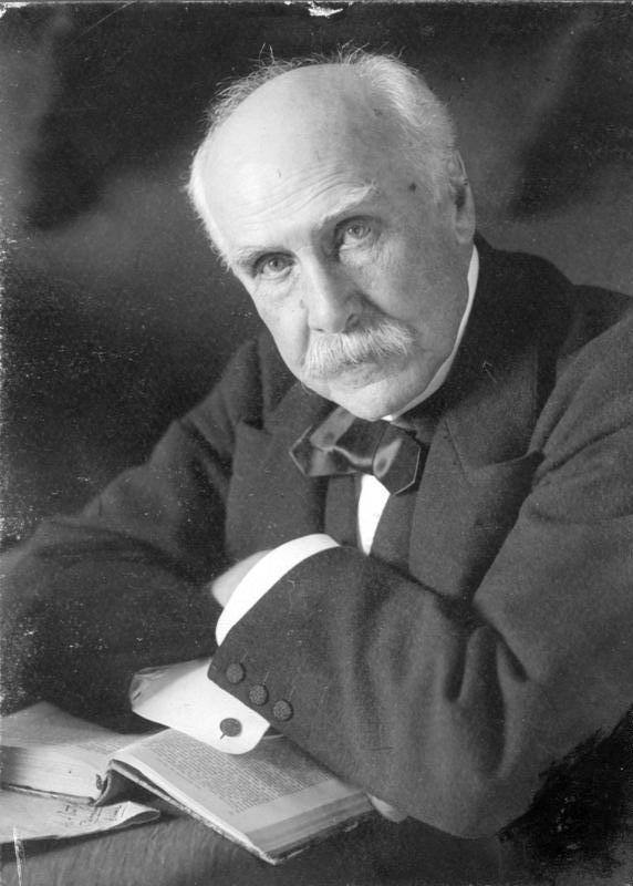 Rudolf Lindau, Diplomat und Schriftsteller 10.10.1829 Gardelegen + 14.10.1910 Paris 26.10.1909 16347-09